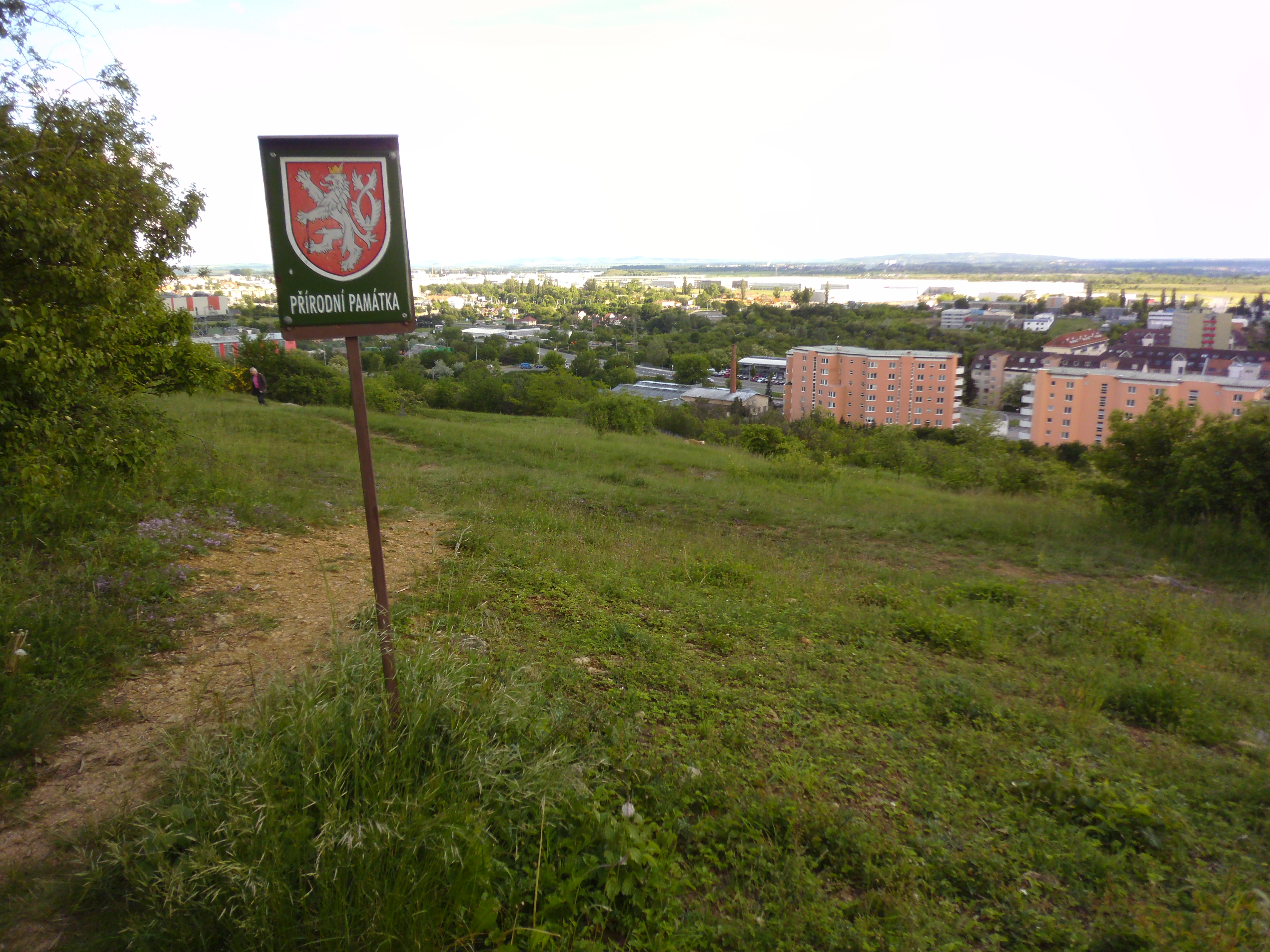 Přírodní památka Bílá hora